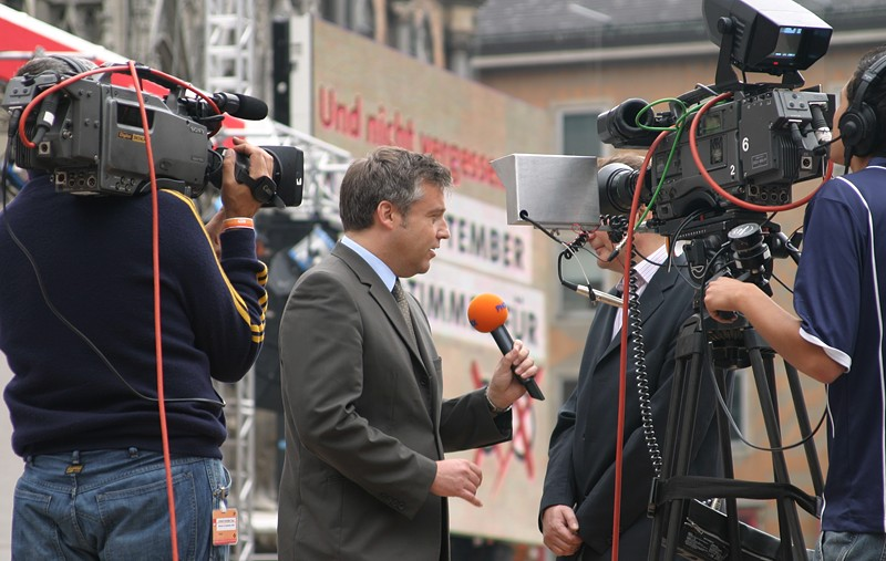 Reporter Heinz Abel (PHOENIX) im Gespräch mit Peter Fahrenholz (Süddeutsche Zeitung, im Bild verdeckt) für die Live-Sendung „Wahl '05“ in München